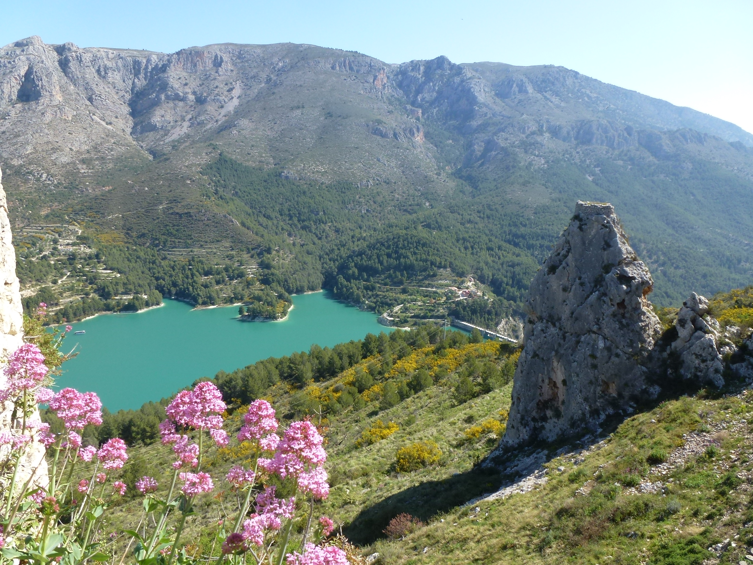 Villa de Guadalest